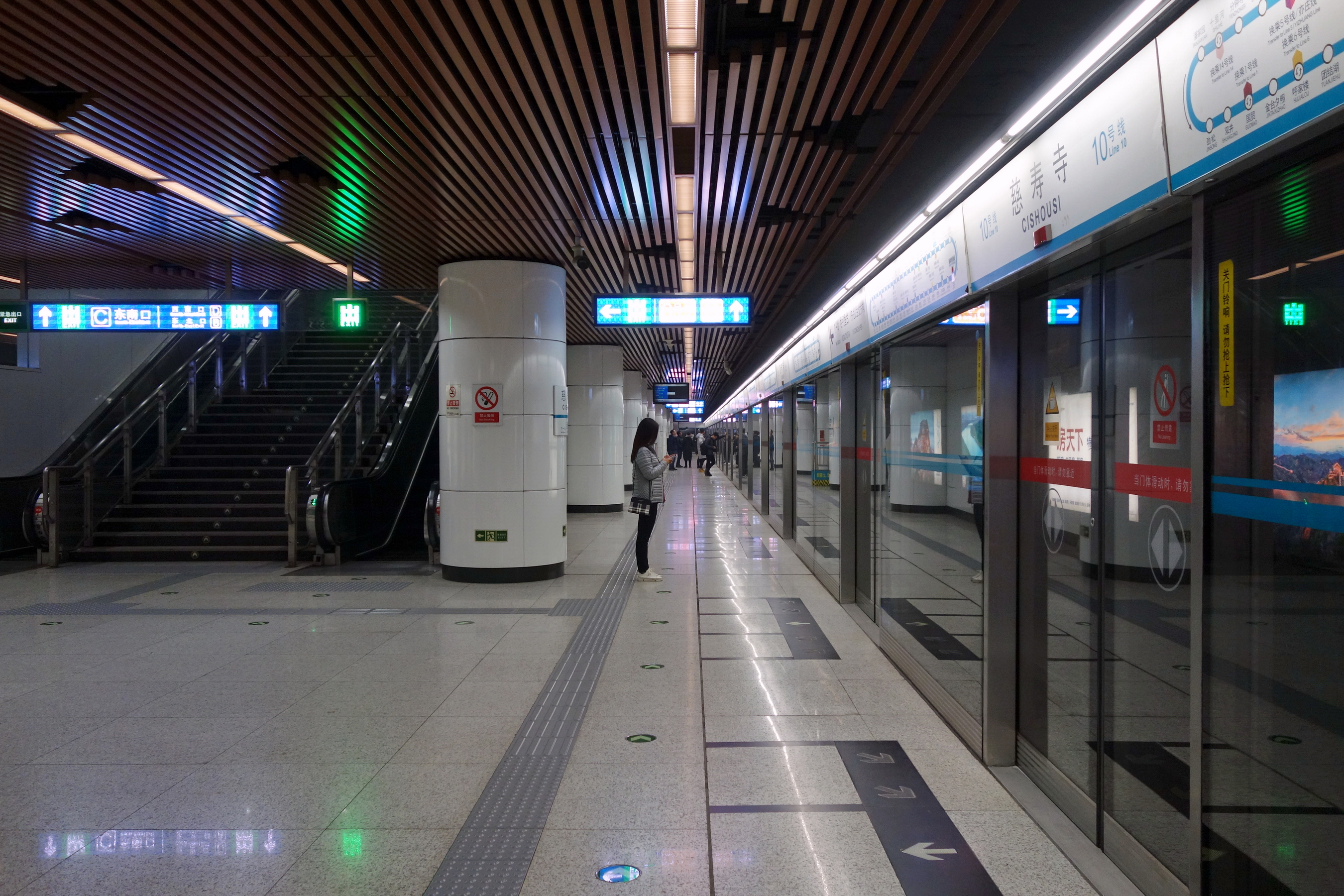 北京地铁10号线慈寿寺站站台